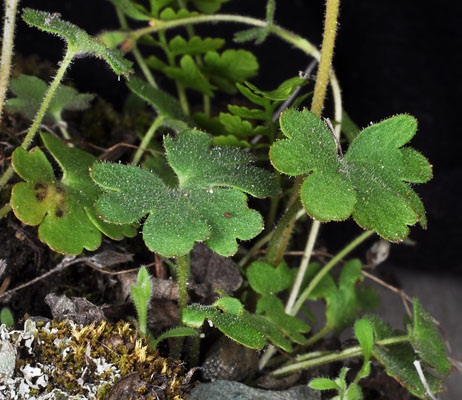 Suksdorfia violacea plant.